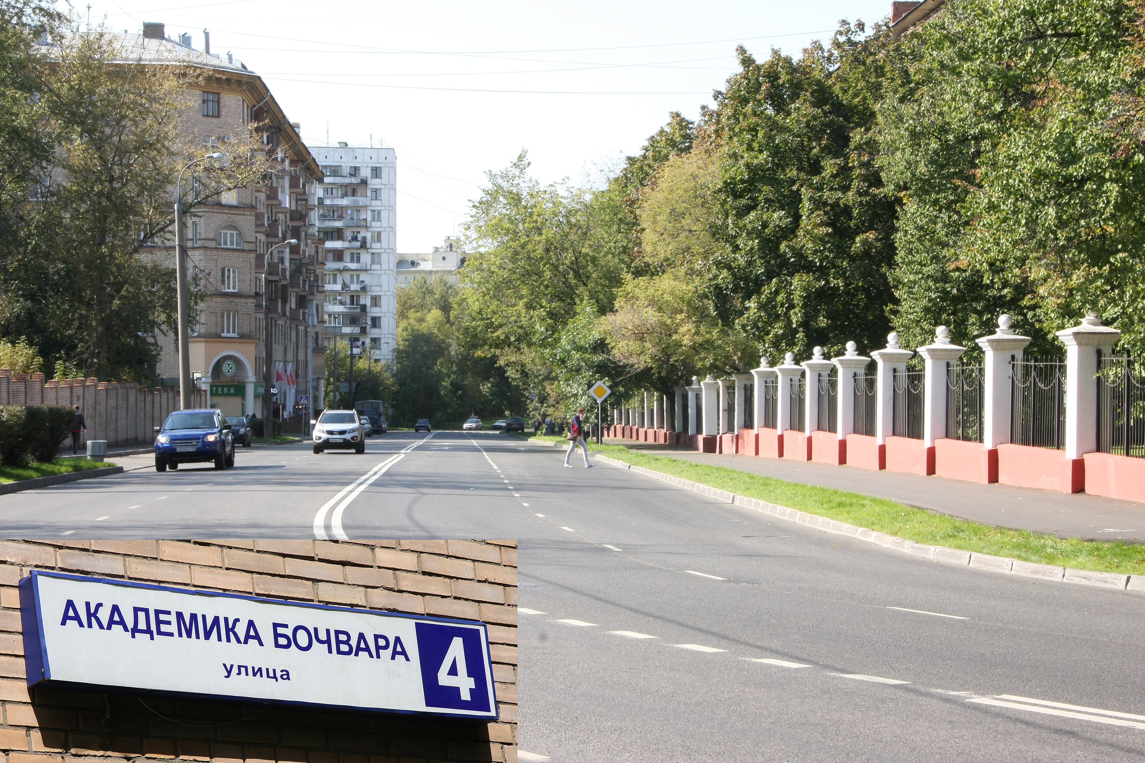 Улица академика Бочвара (бывшая Новощукинская). Справа ограда Шестой больницы (ранее средьмашевская ведомственная, ныне в составе ФМБА).